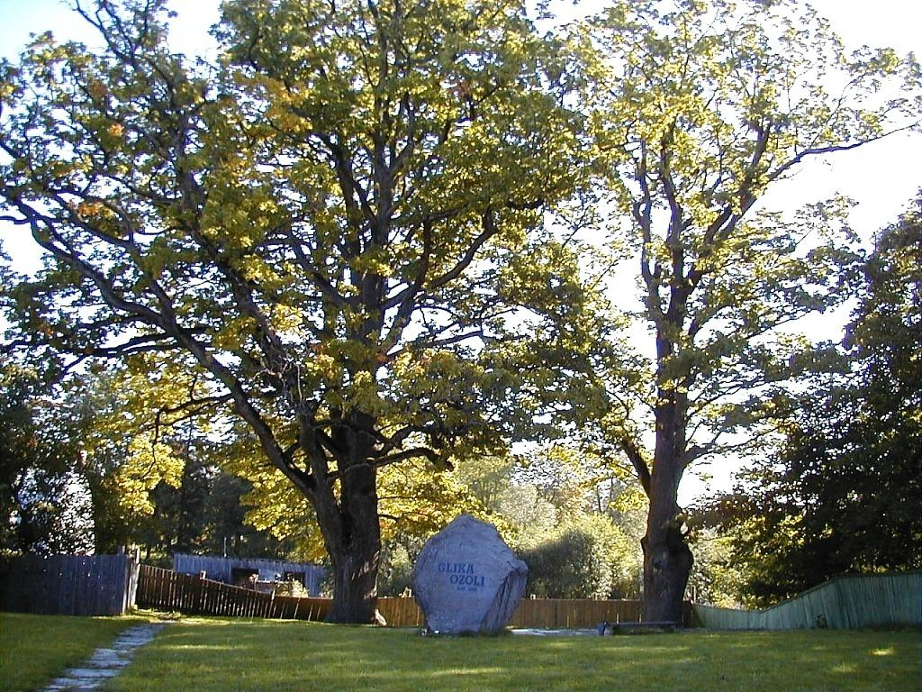 Alūksne, Glika ozoli 2000-09-14